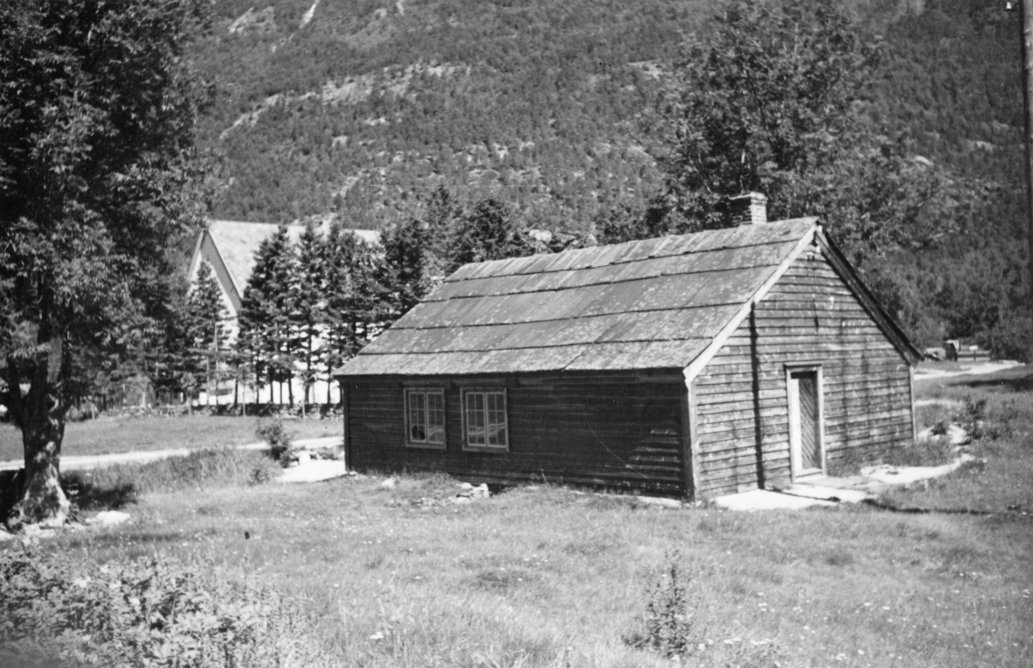 Borgstova i , Vestland}